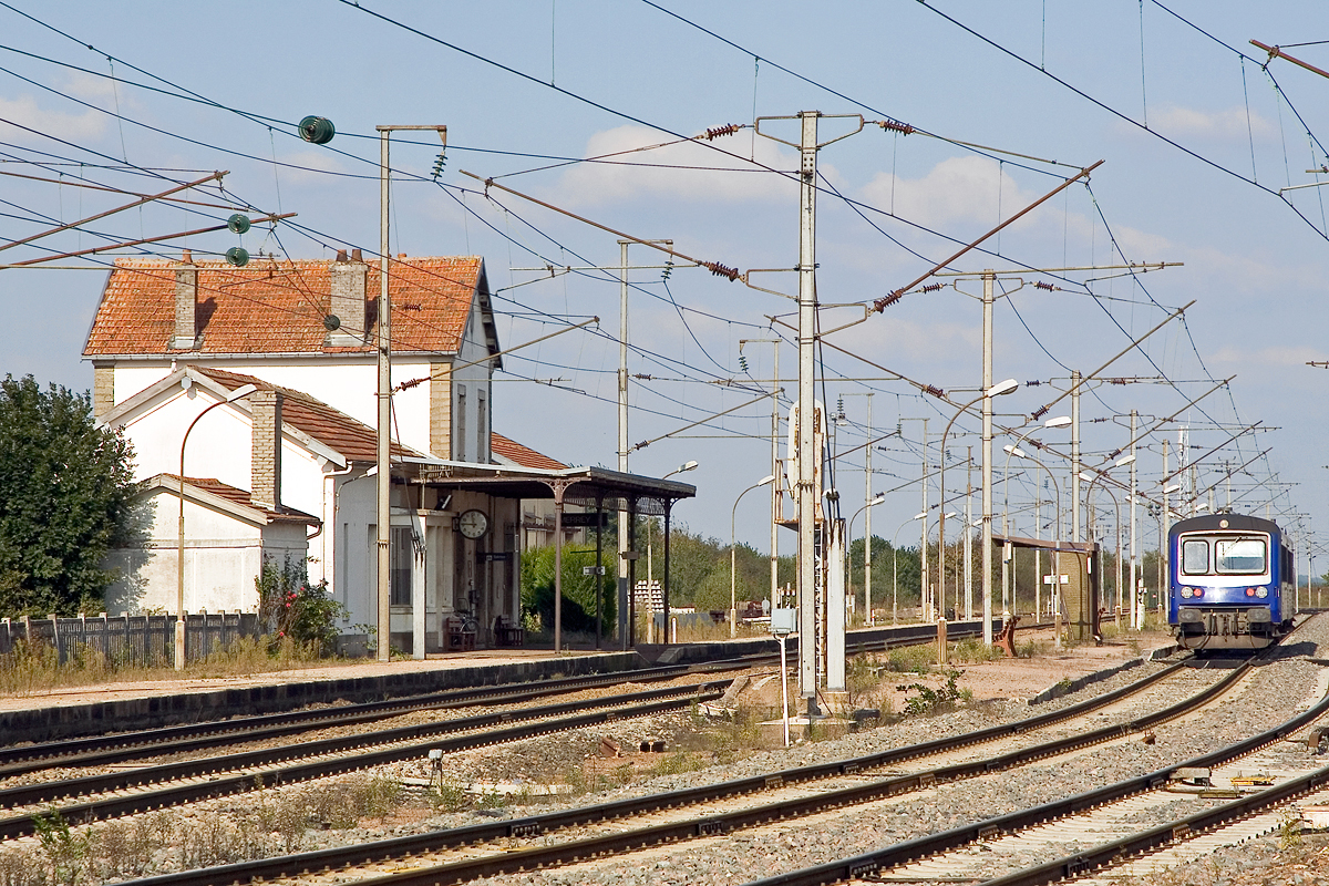 Gare de Merrey (Haute-Marne, Ligne Culmont-Chalindrey - Toul) Enface vers Toul, à droite vers Hymont-Mattaincourt.